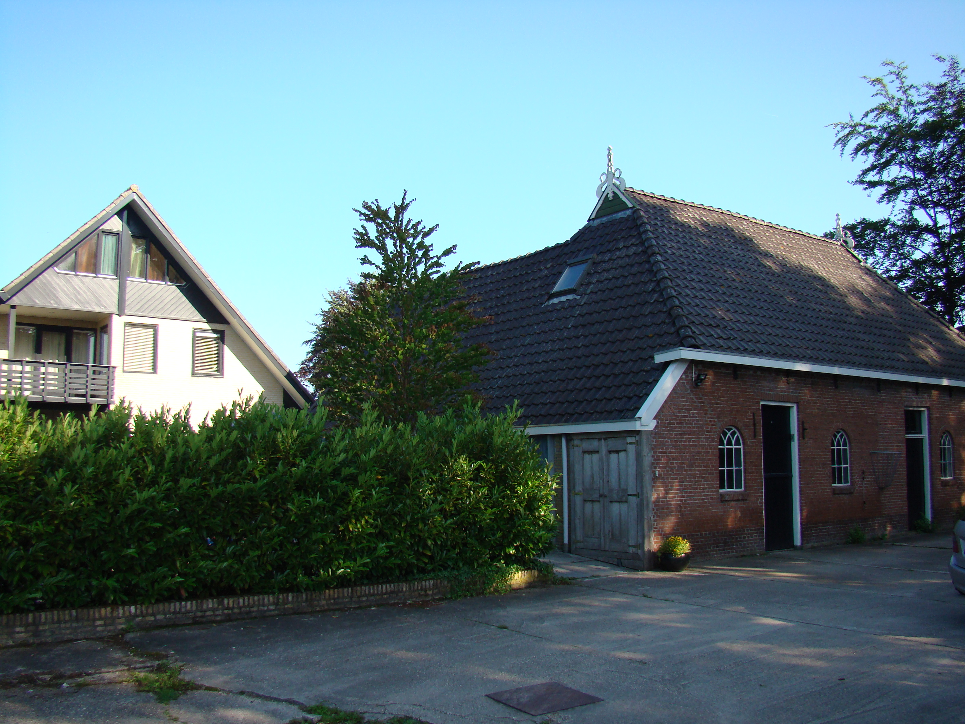 Impressions of Beetsterzwaag (Netherlands)